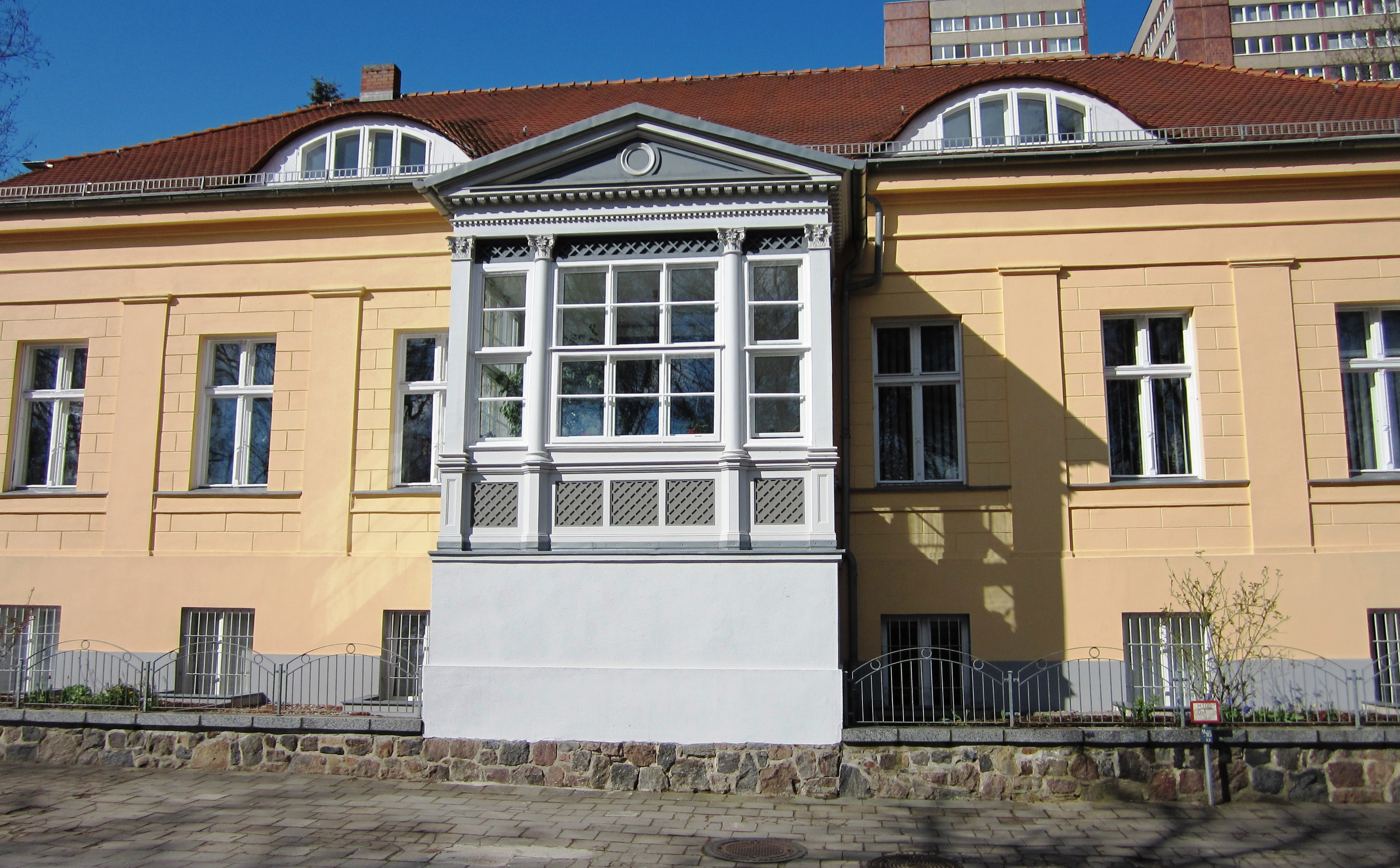 Frankfurt (Oder), Halbe Stadt 8